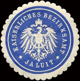 Sealing stamp Title: Kaiserliches Bezirksamt - Jaluit Description: blau, weiß, geprägt Place: Jaluit size: 4 cm